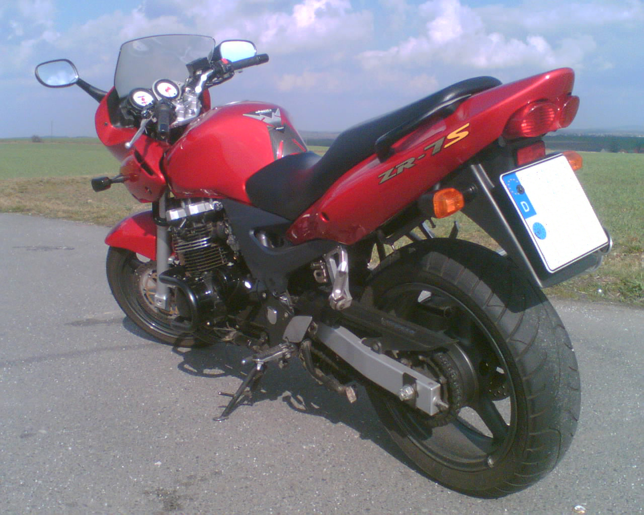 Kawasaki ZR7S